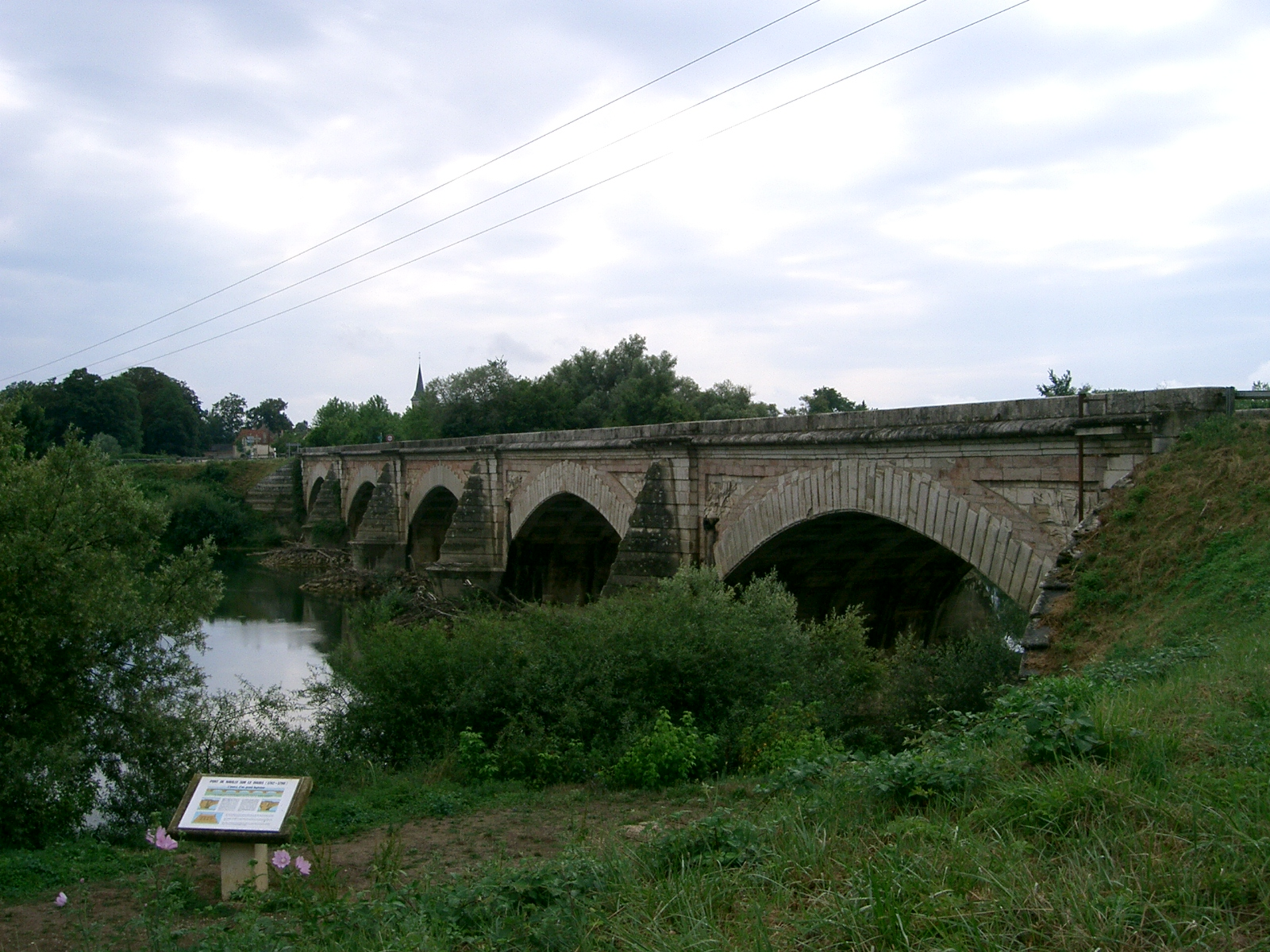 Pont de Navilly sur le Doubs (71) - fin 18°siècle self made PRA